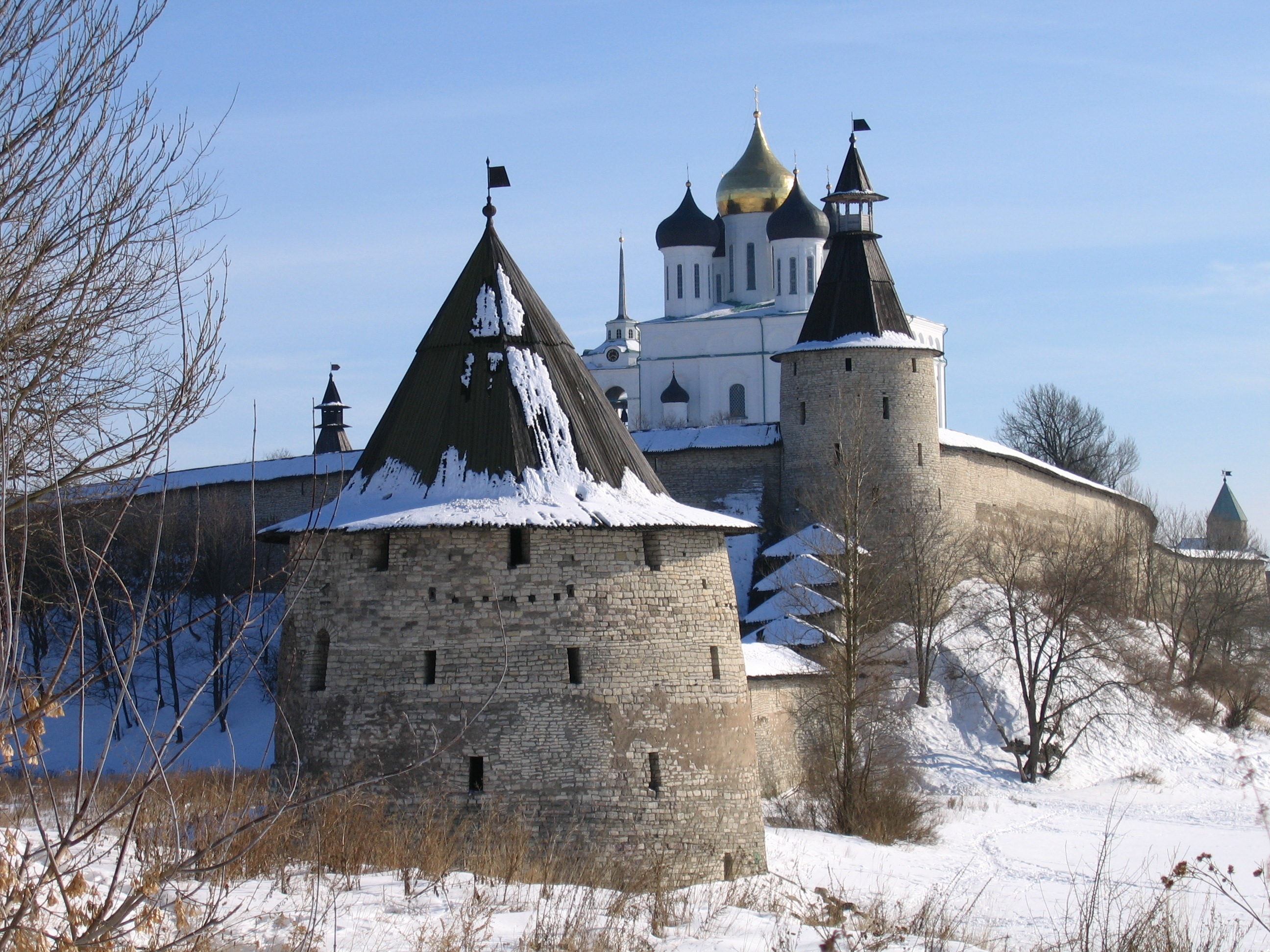 Pskov's Kremlin, Псковский Кремль